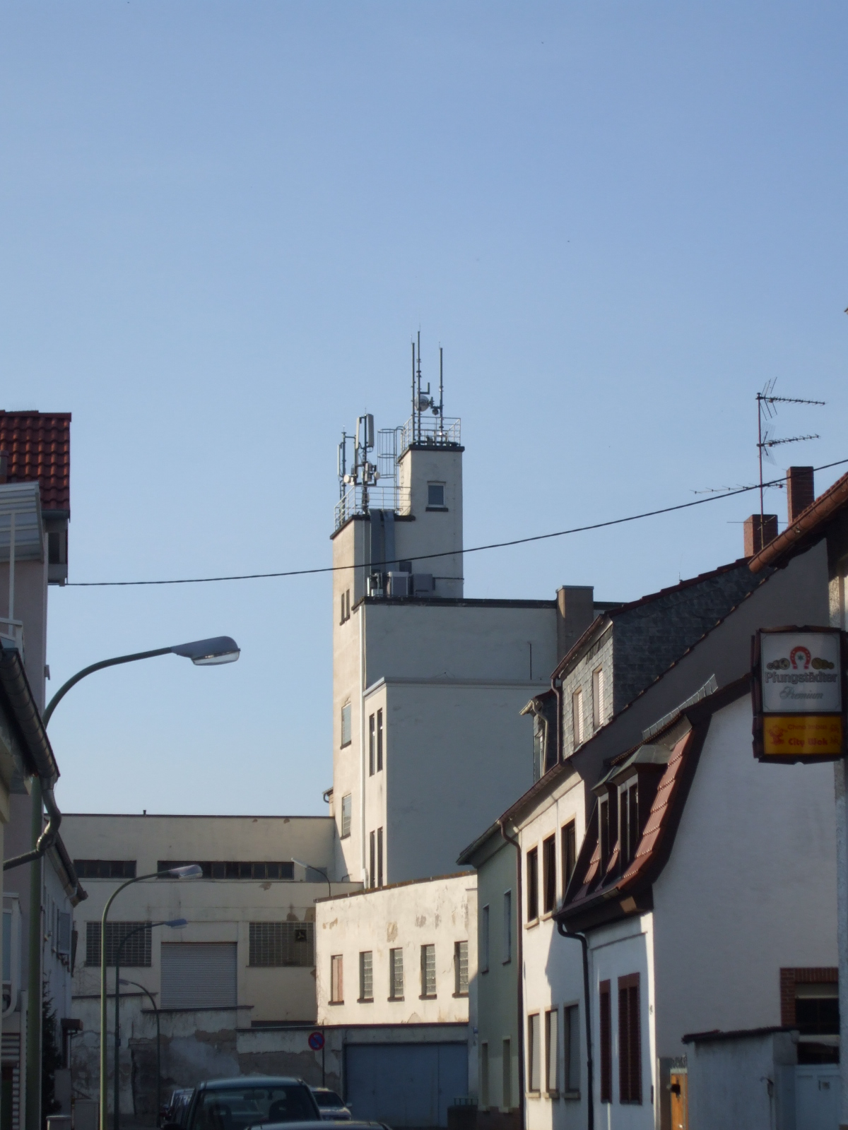 Ansicht der ehemaligen Brauerei vom Frankenthaler Weg aus